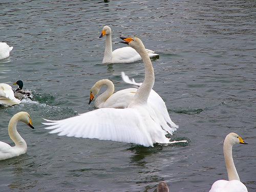 Cygnus cygnus, Hokkaido, Japan